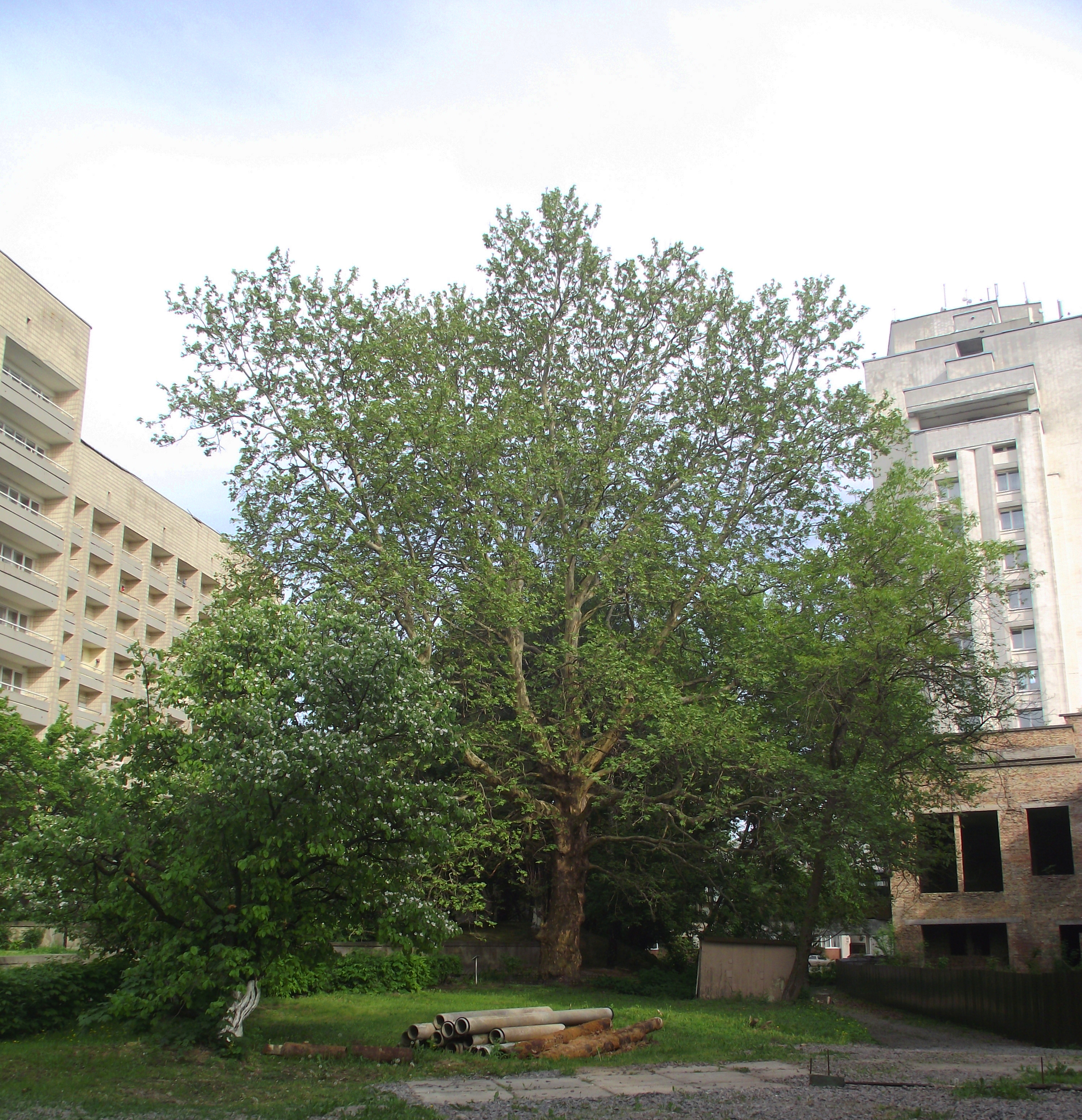 Близько 100 років Обсяг 4,06 м Висота 15 м